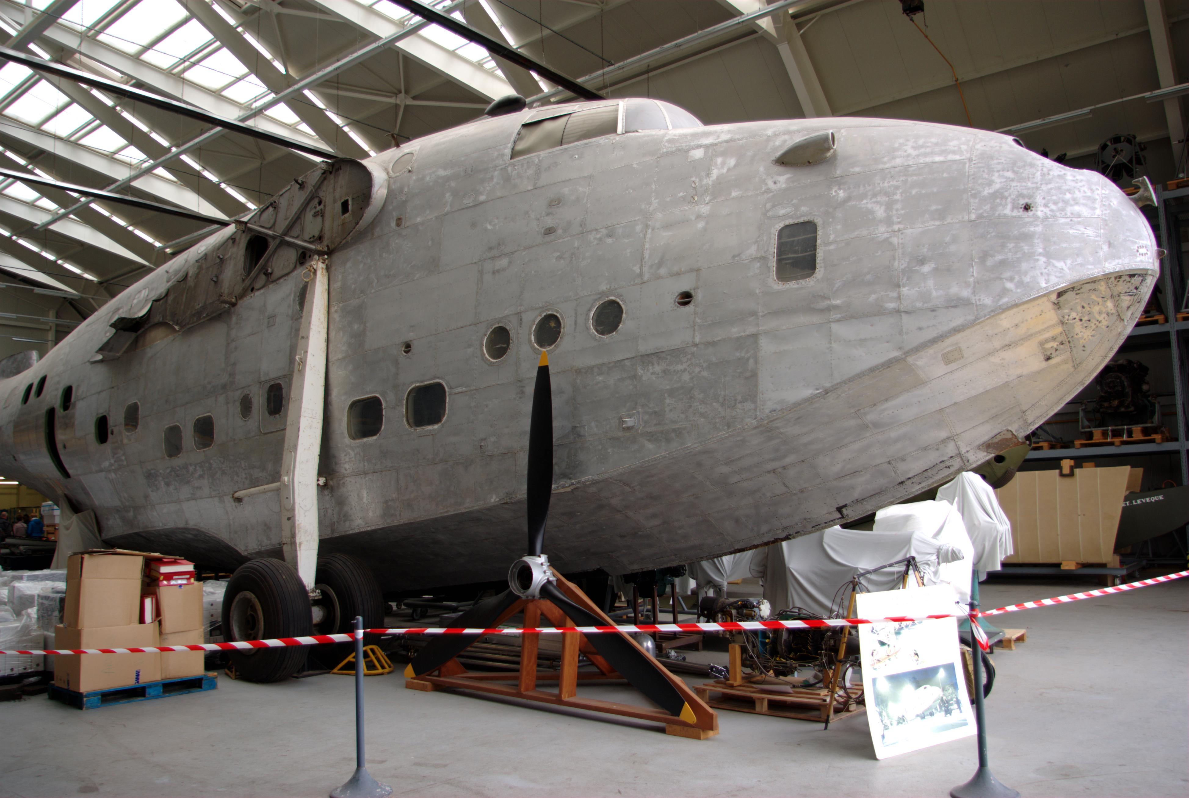 Short Sunderland V en cours de restauration dans les réserves du musée de l'Air et de l'Espace à Dugny ouvertes lors des Journées du patrimoine en 2015.